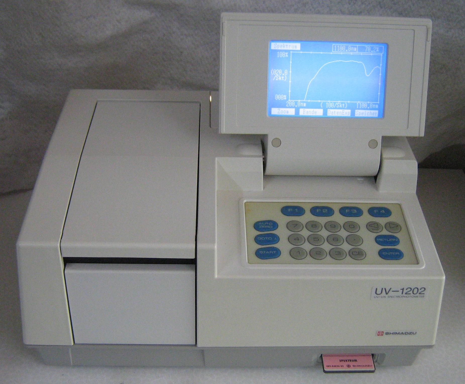 Spektrometer für Transmissionsmessungen im Wellenlängenbereich von 200 bis 1100 nm